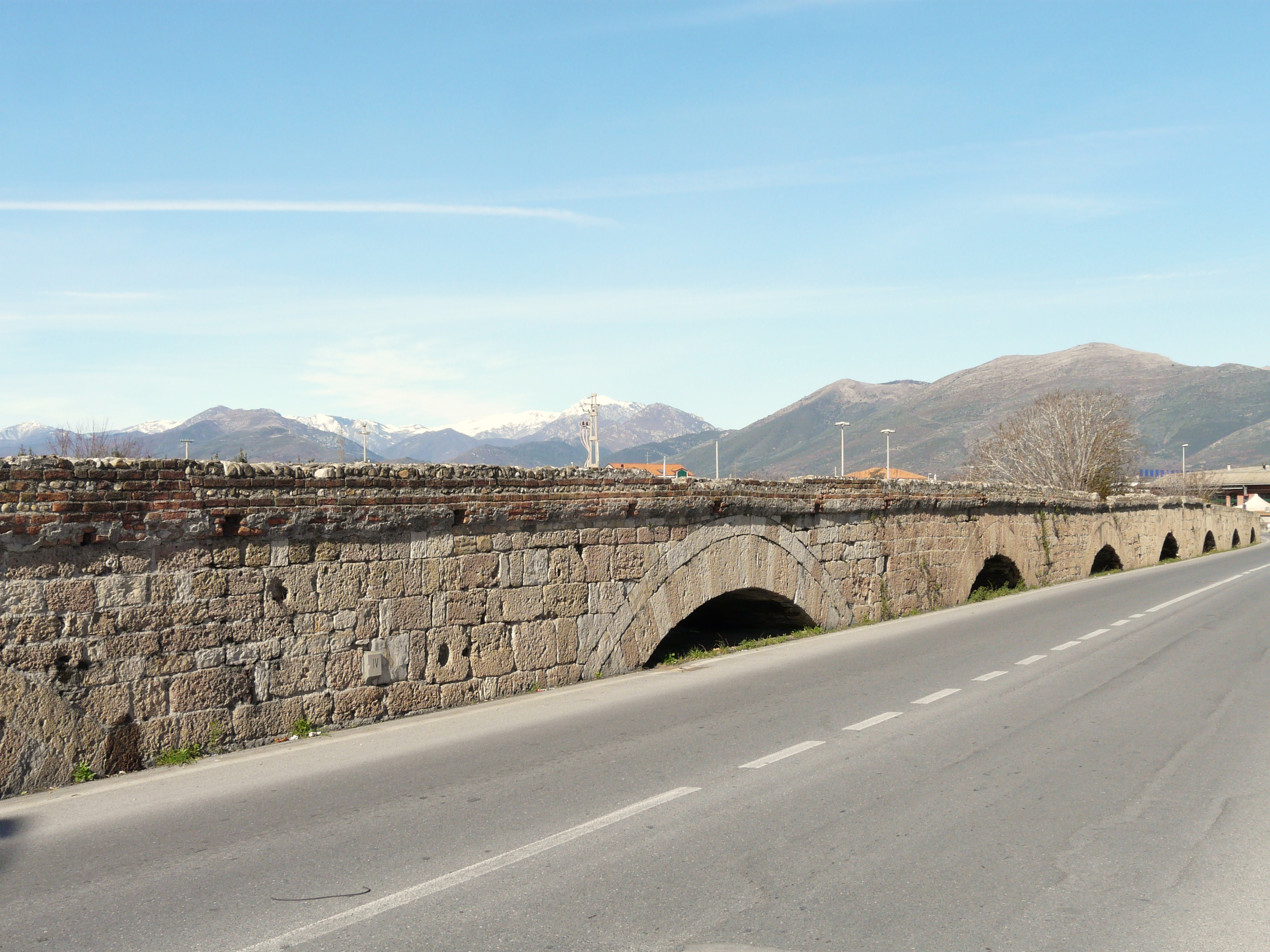 "Pontelungo" presso il santuario di Nostra Signora di Pontelungo, Albenga, Liguria, Italia